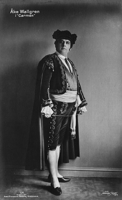 Åke Wallgren i Carmen.